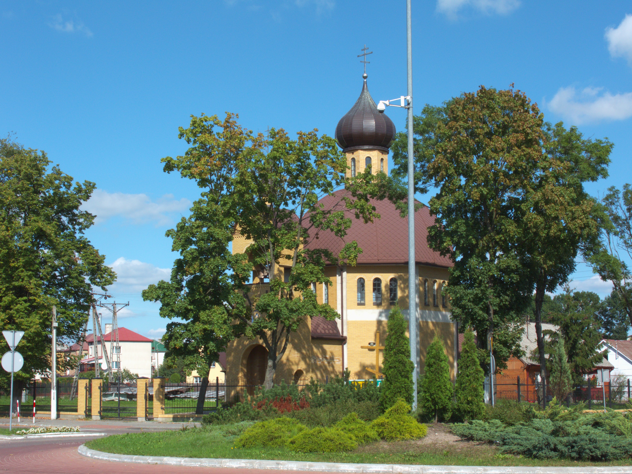 Cerkiew św. Symeona Słupnika w Brańsku.